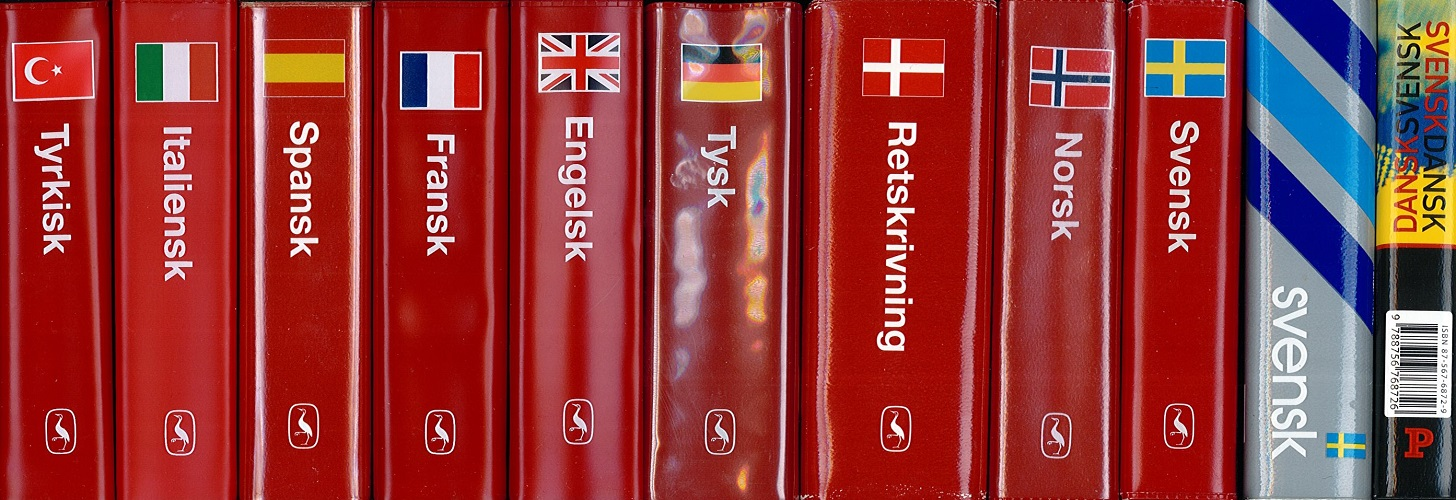 Hele serien af Gyldendals røde miniordbøger sammenlignet med én af Gads stribede small og én af Politikens miniordbøger.